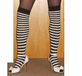 Overknees